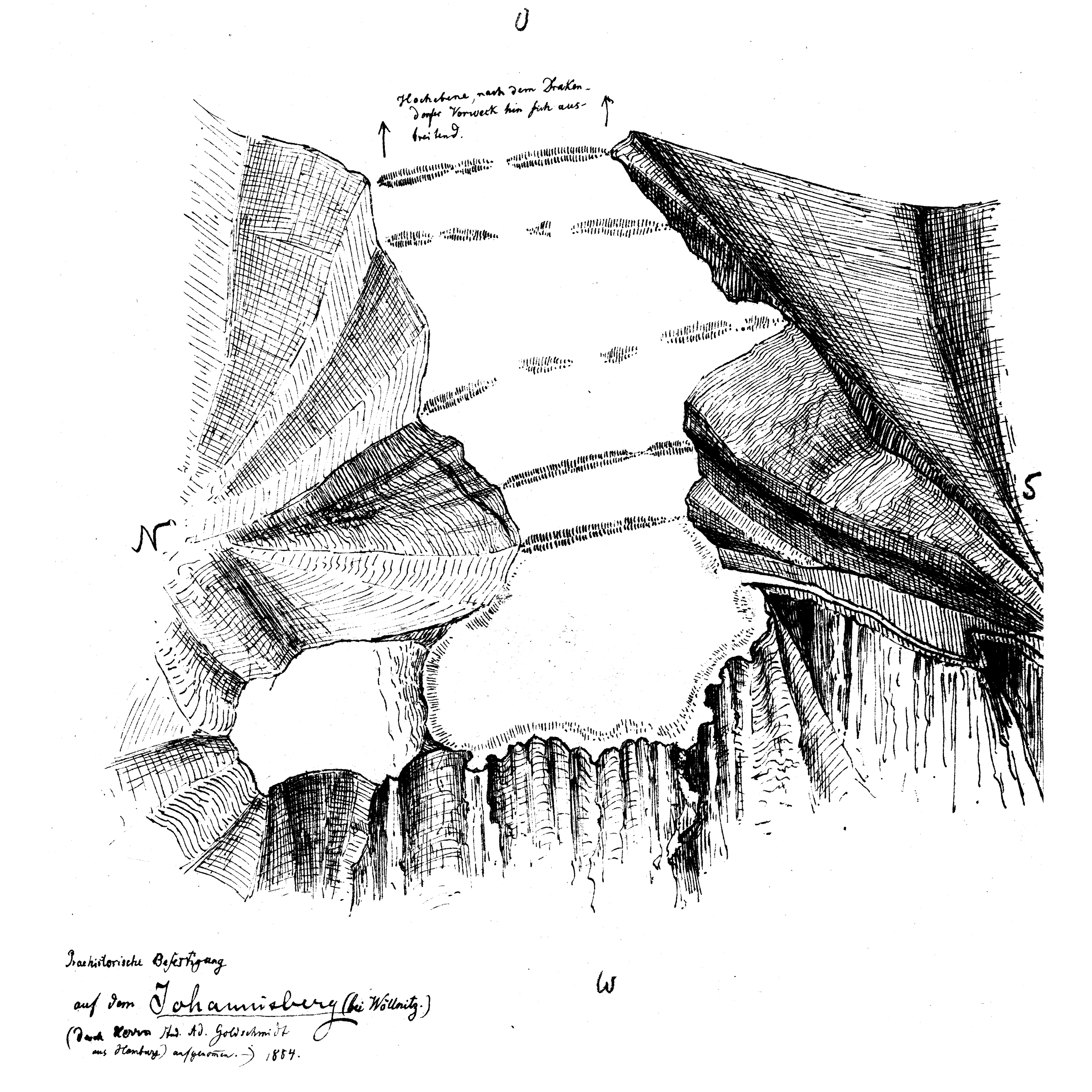 Jena-Lobeda, Johannisberg. Skizze der Wallanlagen von A. Goldschmidt 1884.